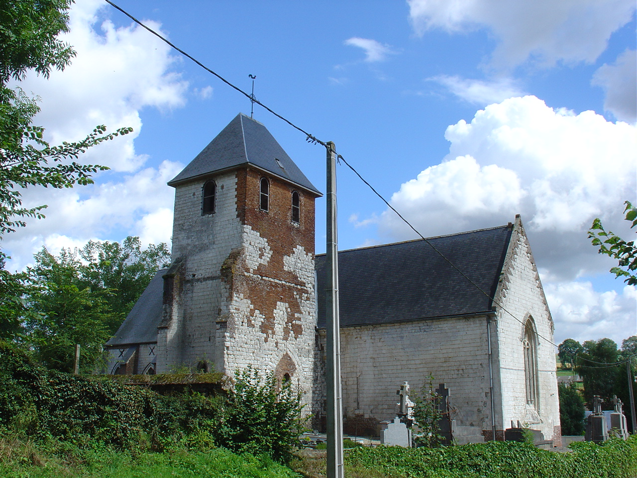 Église de Sempy